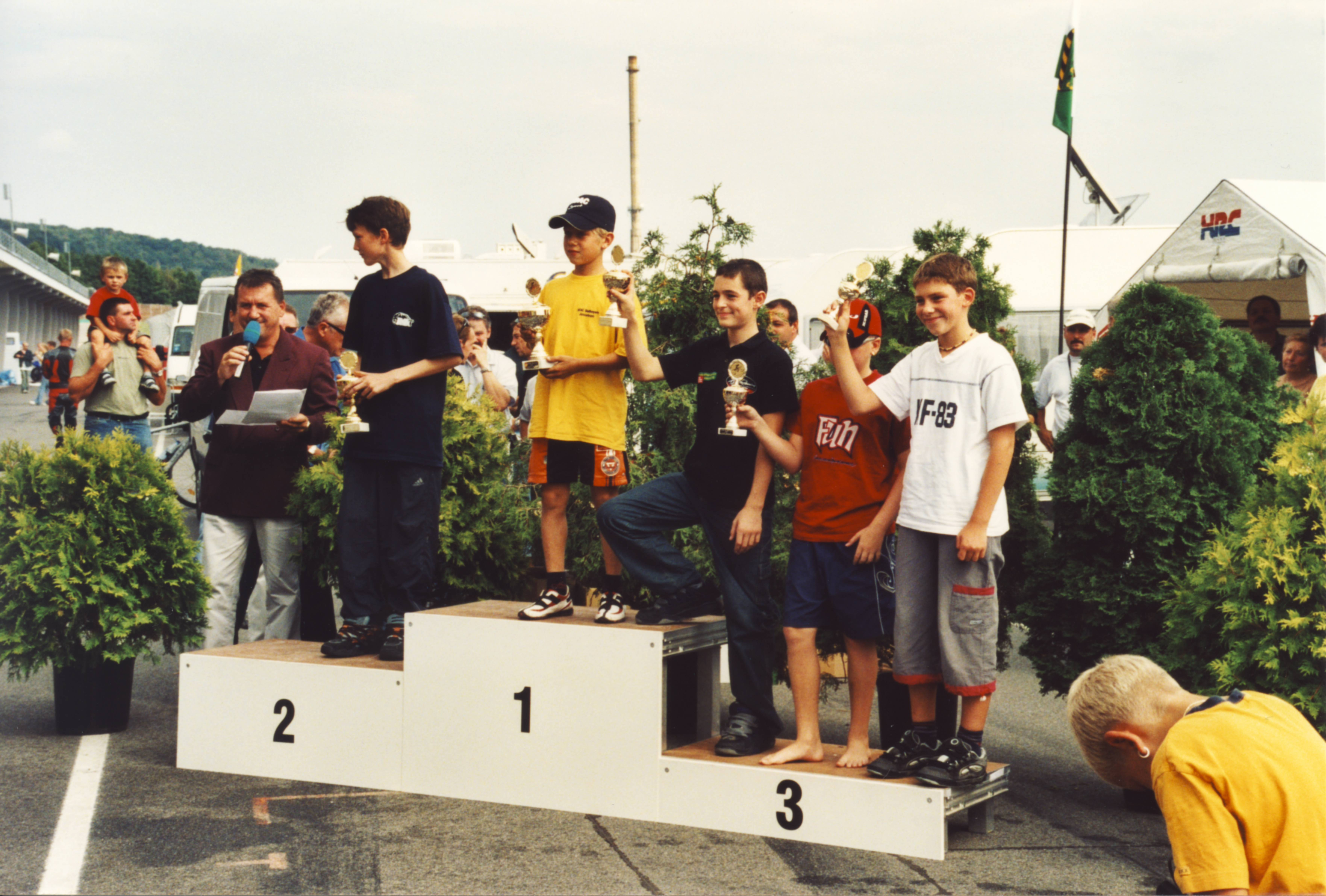 Siegerehrung - Marcel Schrötter auf dem Siegertreppchen.